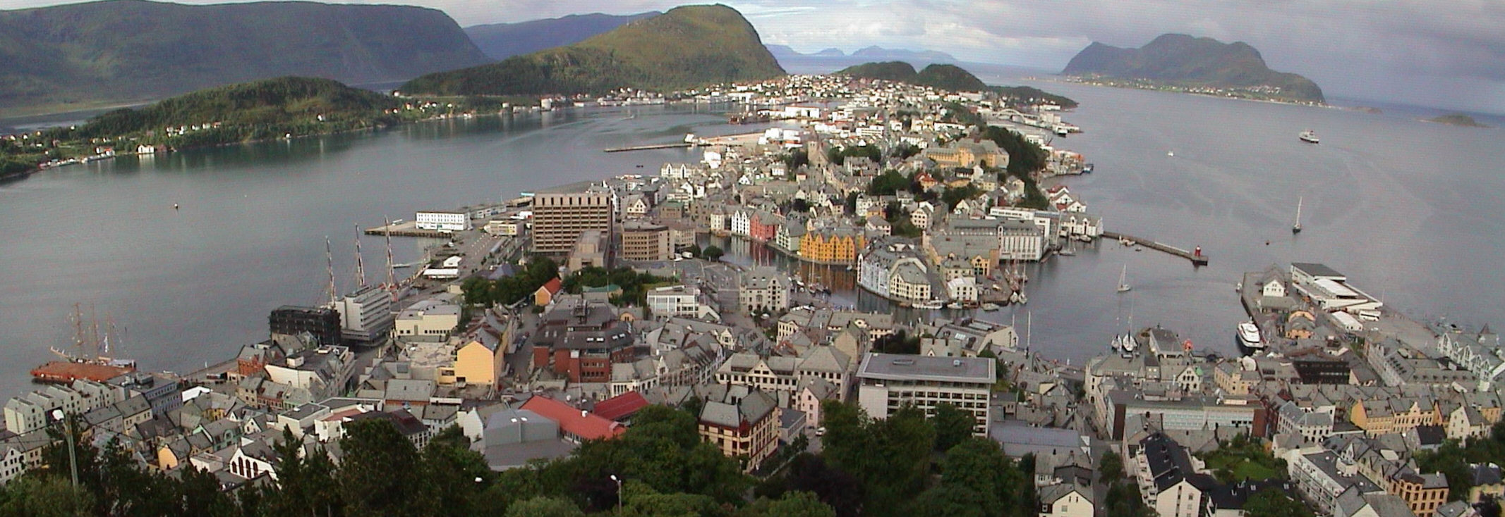 Ålesund, panorama from Aksla